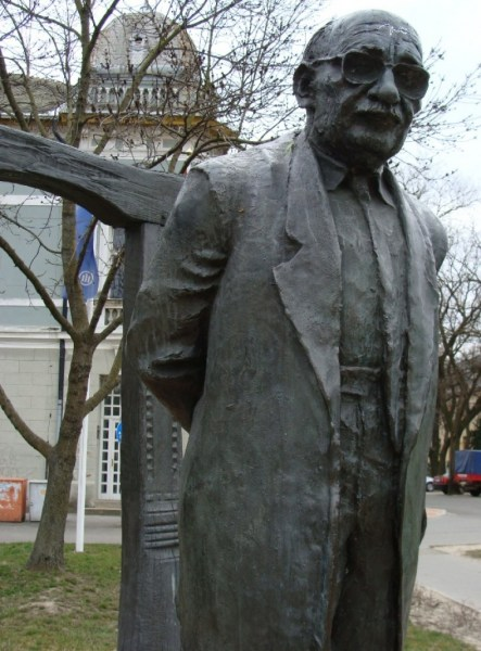 Németh Gyula szobra, Karcag, 1990. Györfi Sándor alkotása.